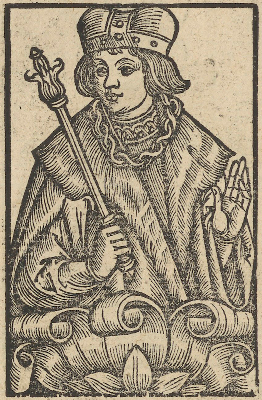 Беларуская (тарашкевіца): Уяўны партрэт князя Любарта (Lubarta), сына вялікага князя Гедзіміна (Giedzimin)